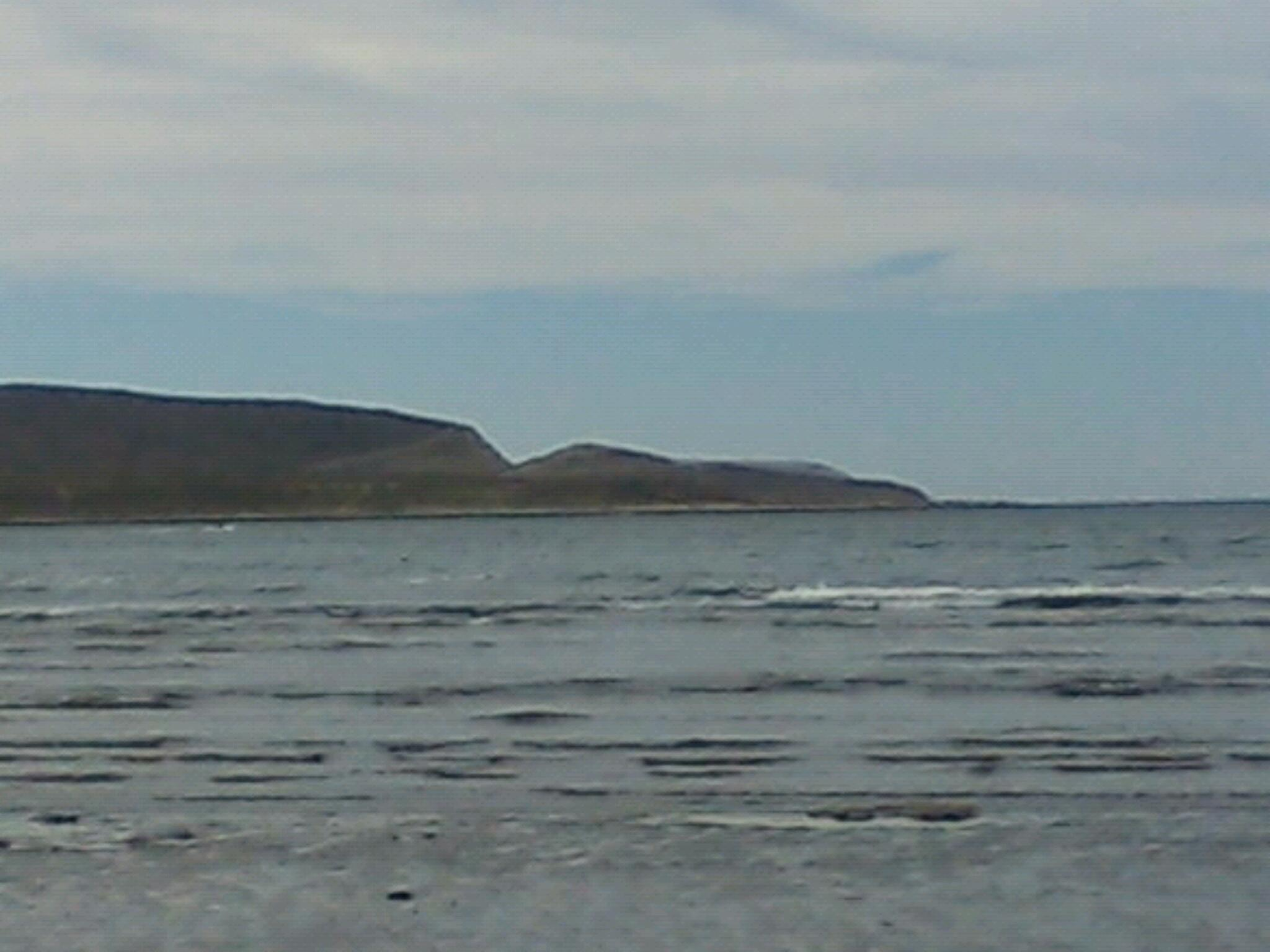 Punta Peligro